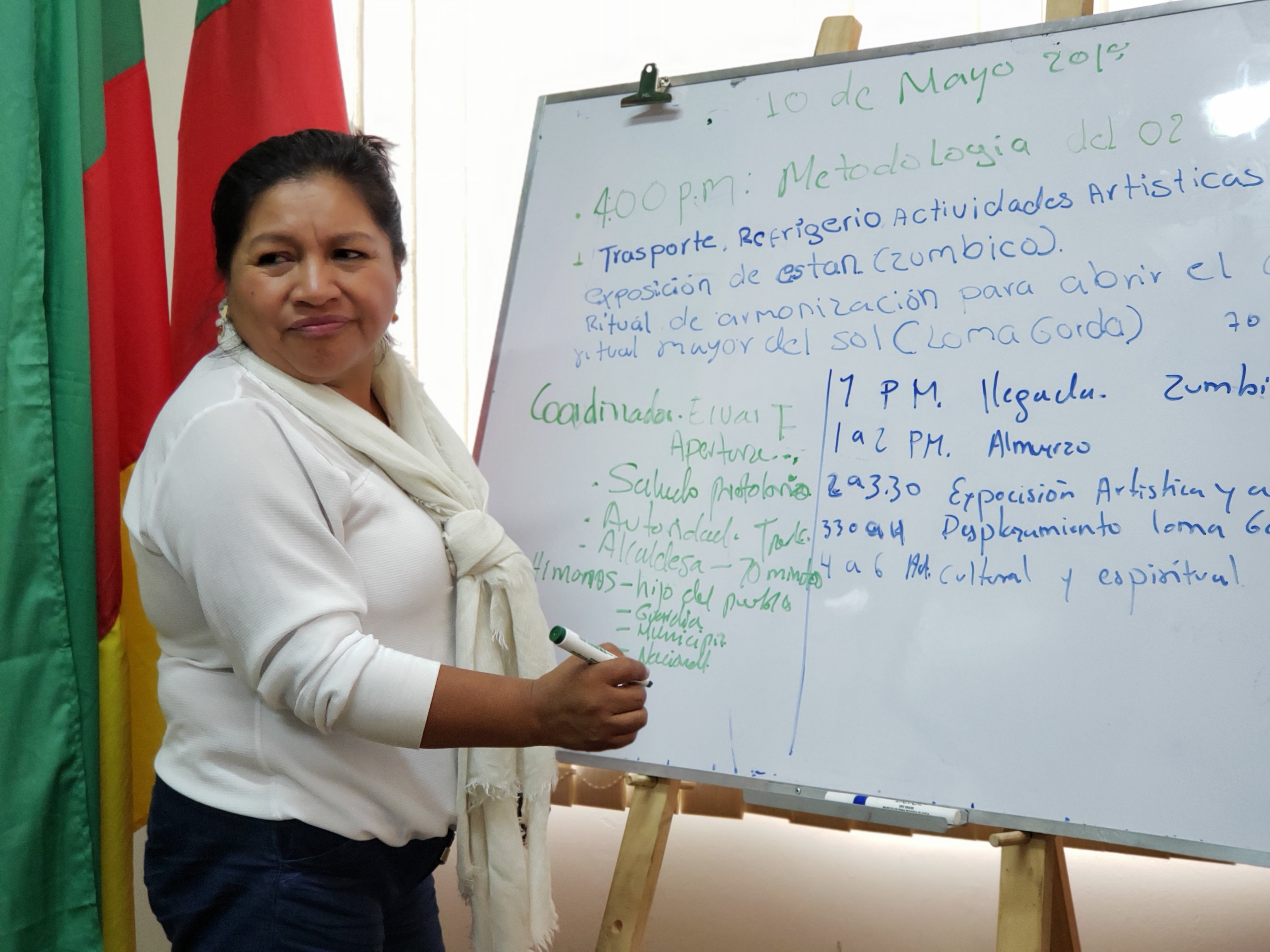 Flor Ilva Tróchez Ramos, alcaldesa municipal de Jambaló (Cauca - Colombia) lidera una reunión de planificación junto su equipo de gobierno (mayo de 2018)